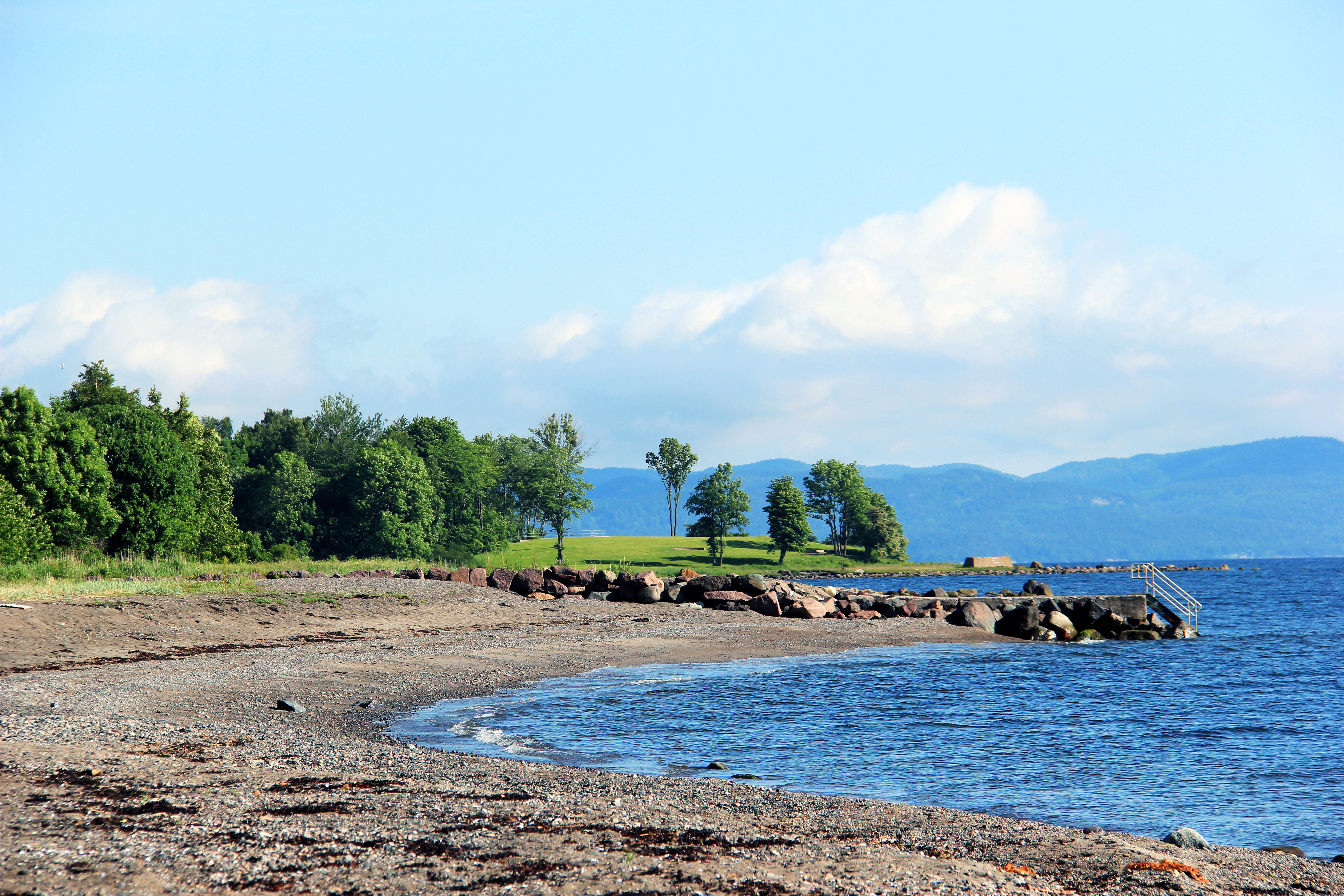 Beach in Karljohansvern